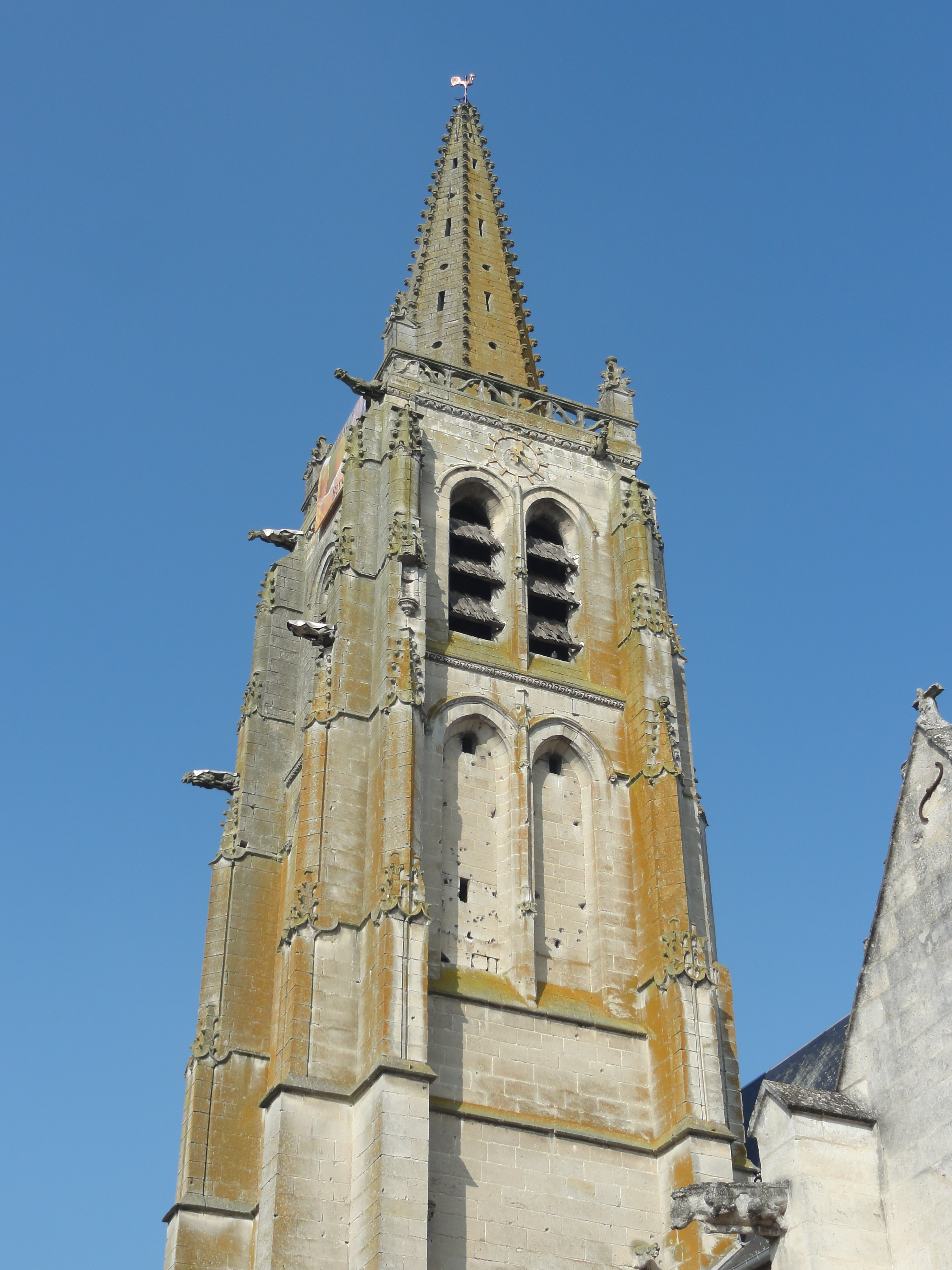 Le clocher flamboyant.